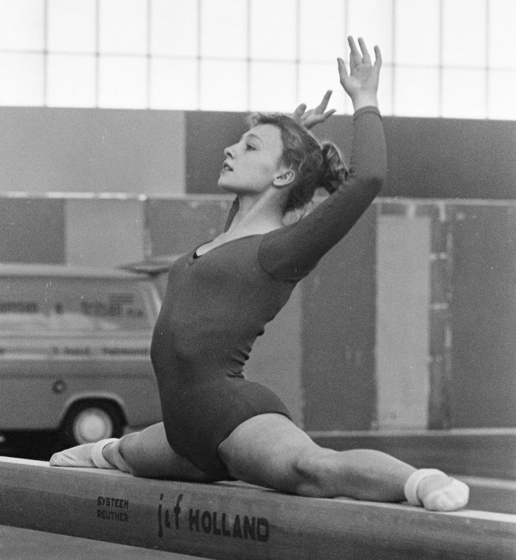 Natalia Kuchinskaya at the European Championships